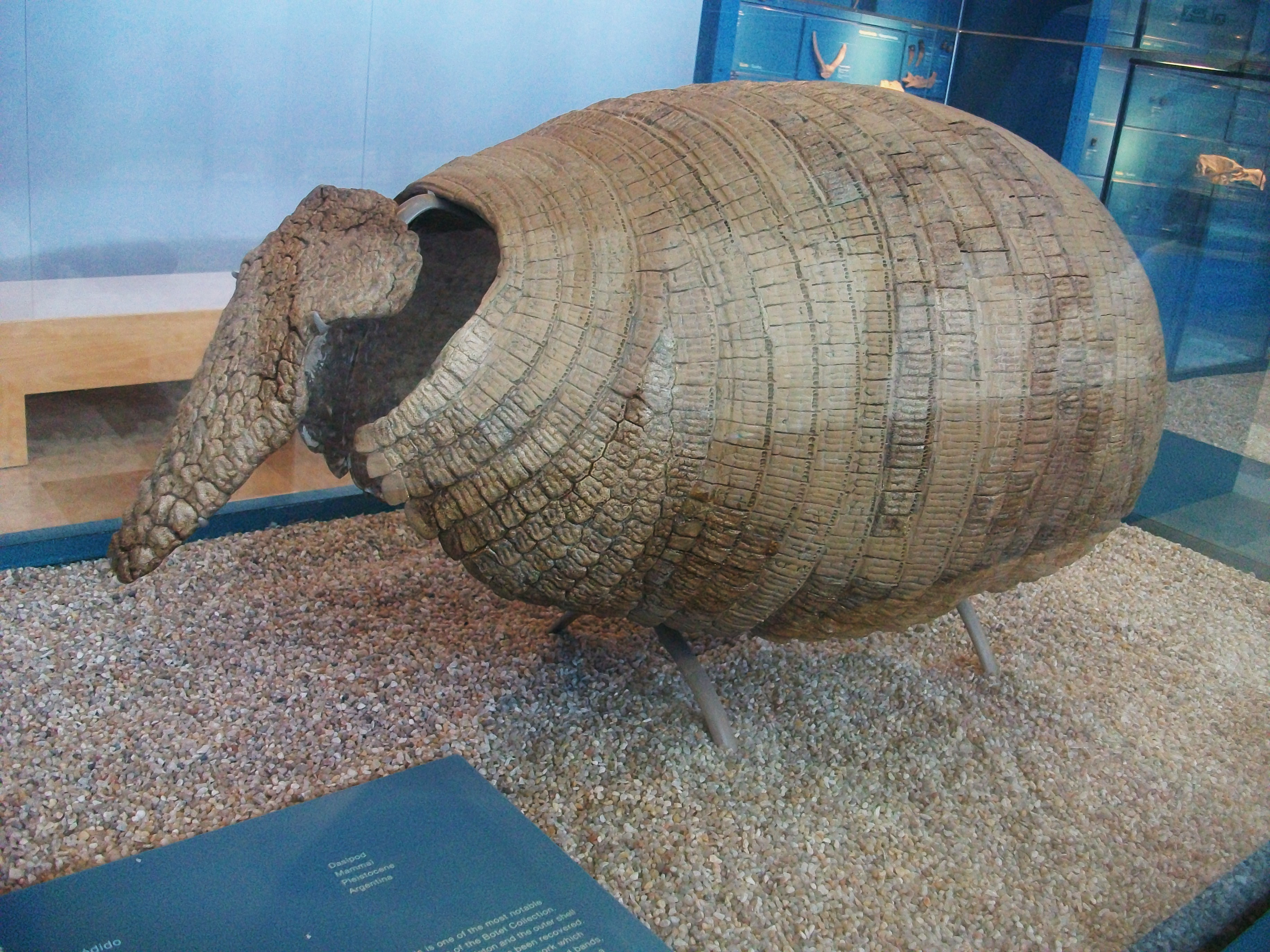 Carcassa d'Eutatus punctatus, dasipòdid, Museu de Ciències Naturals de València.